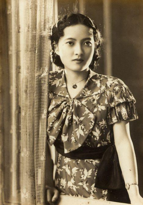 《主婦之友》封面的高慈美